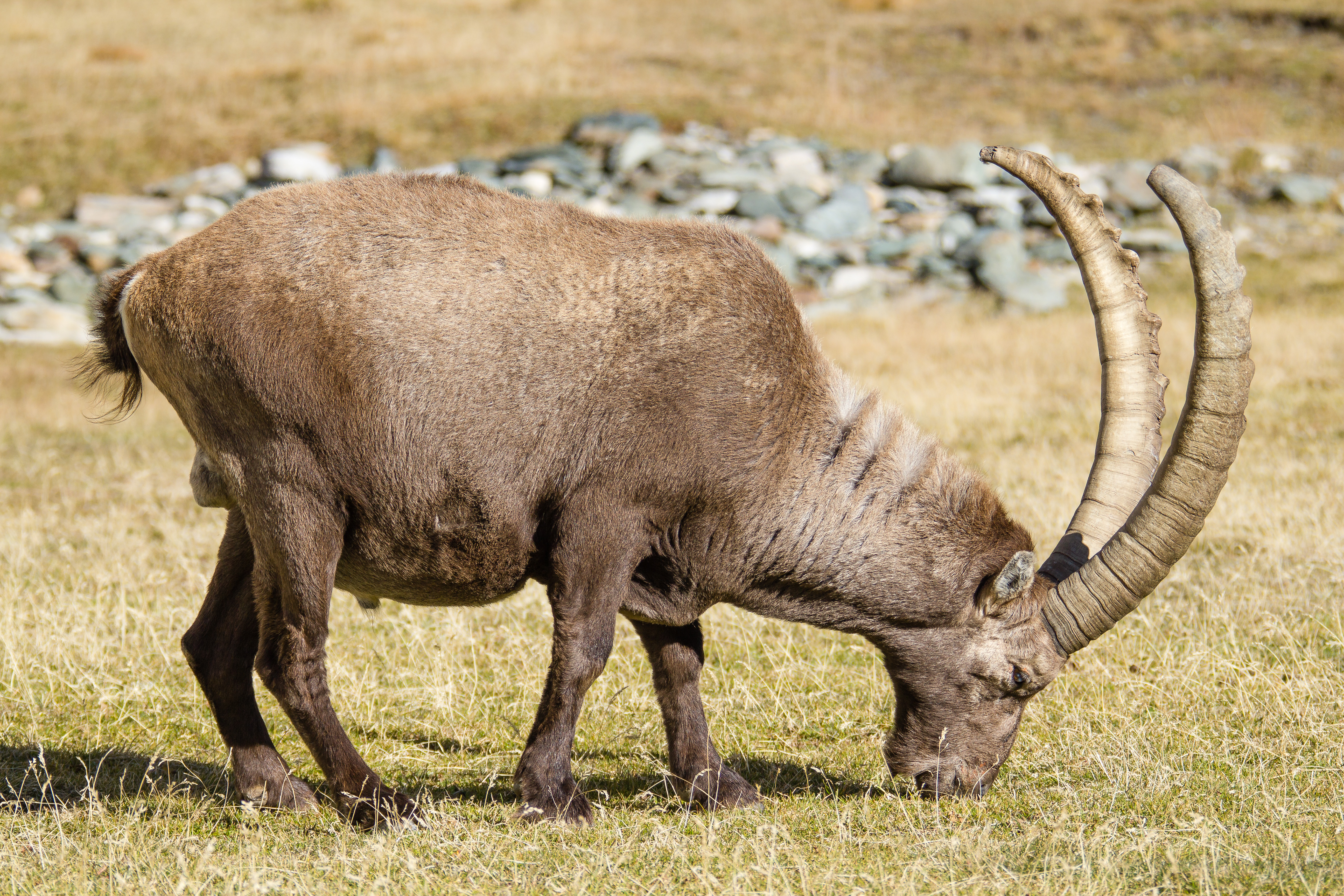 Taken at the Rifugio Vittorio Sella, Vallone del Lauson